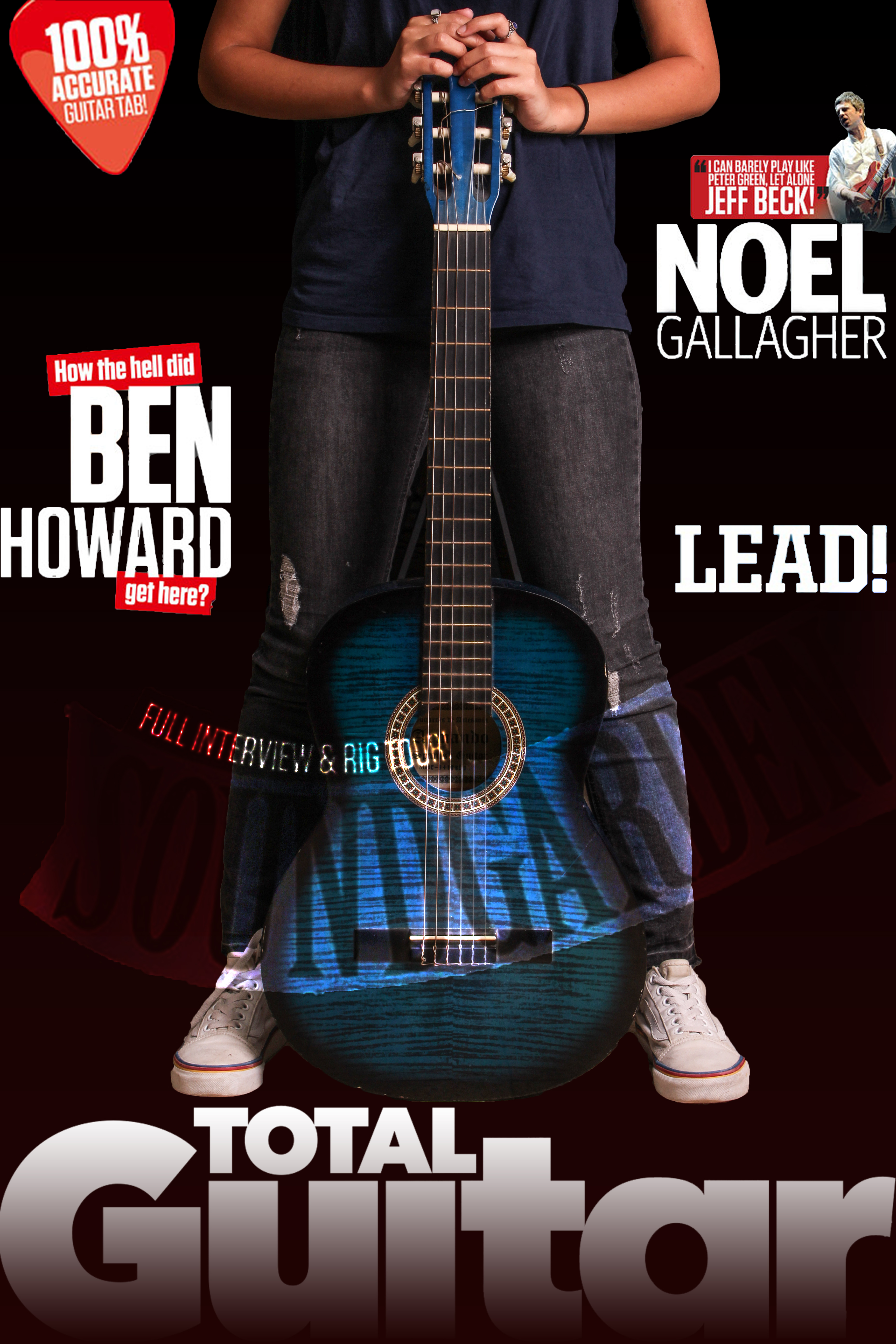 שער מגזין ערוך למגזין גיטרות